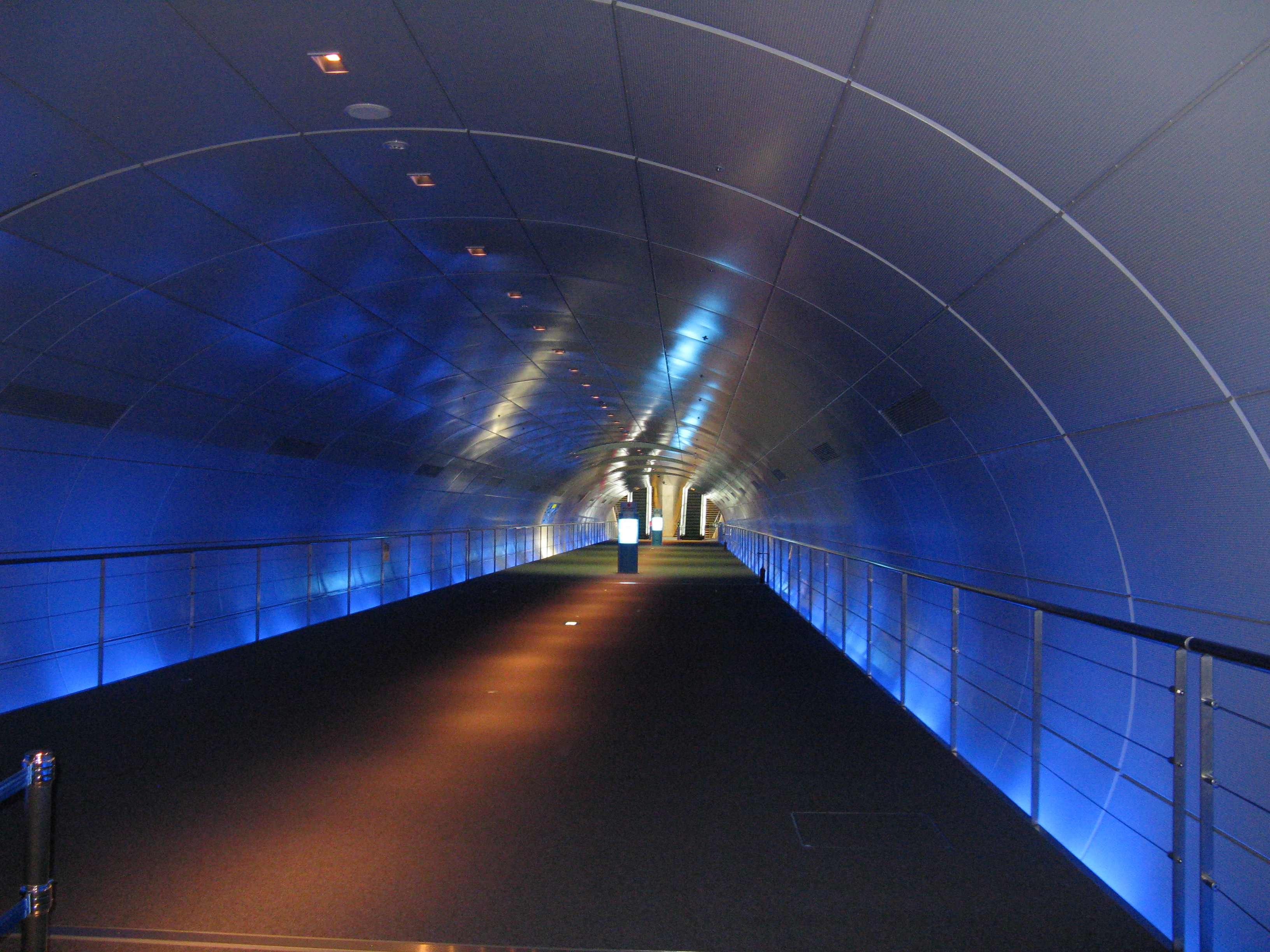 なにわの海の時空館の海底トンネル